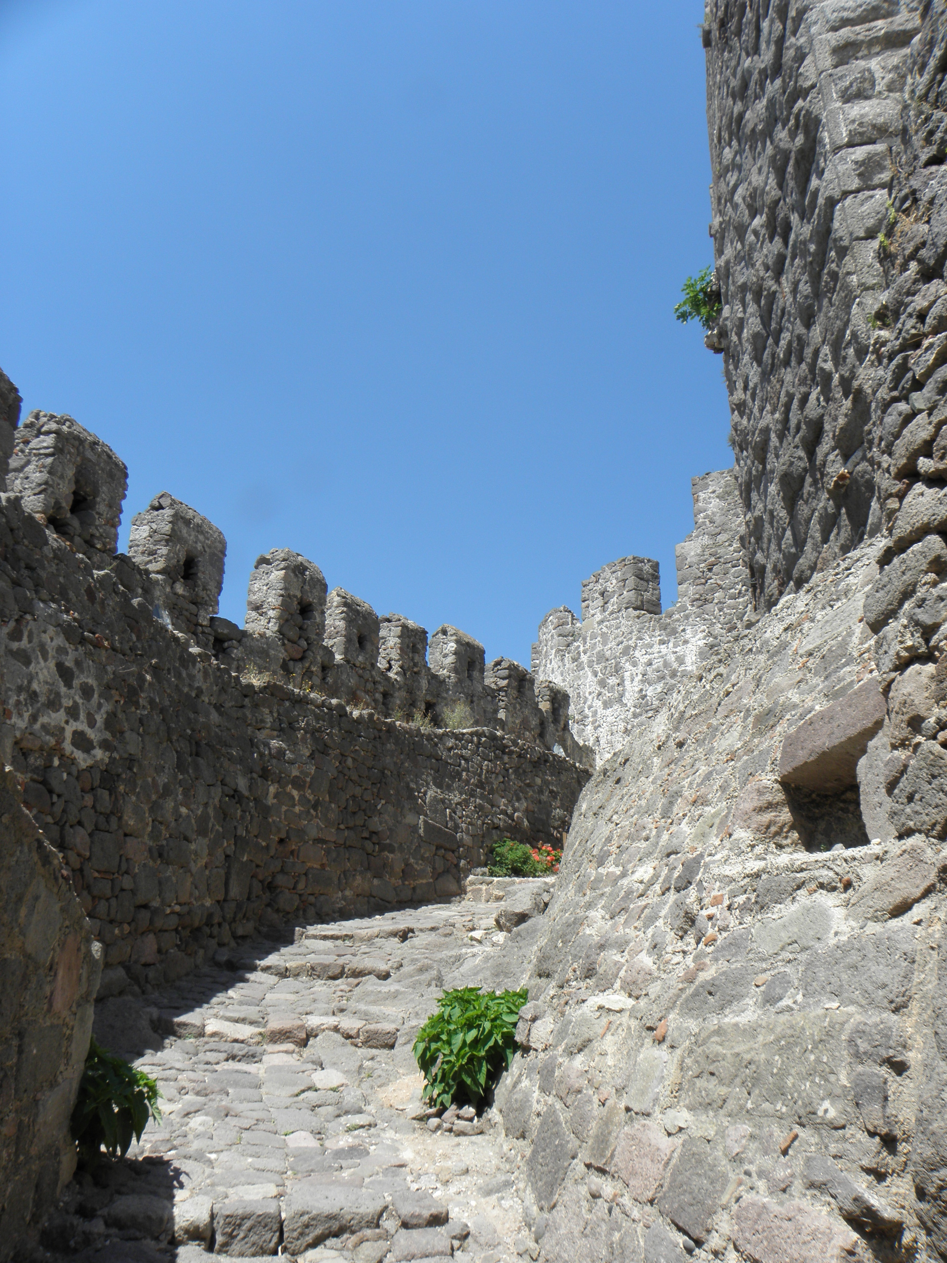 Pevnost v Mithymně, Lesbos